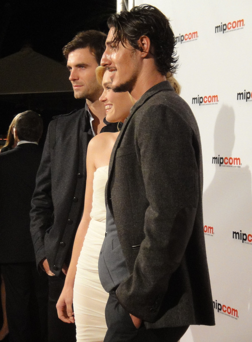 Gli attori Lucas Bryant (a sinistra), Emily Rose (al centro) ed Eric Balfour (a destra), i tre protagonisti della serie televisiva Haven, fotografati il 4 ottobre 2010 al MIPCOM di Cannes.